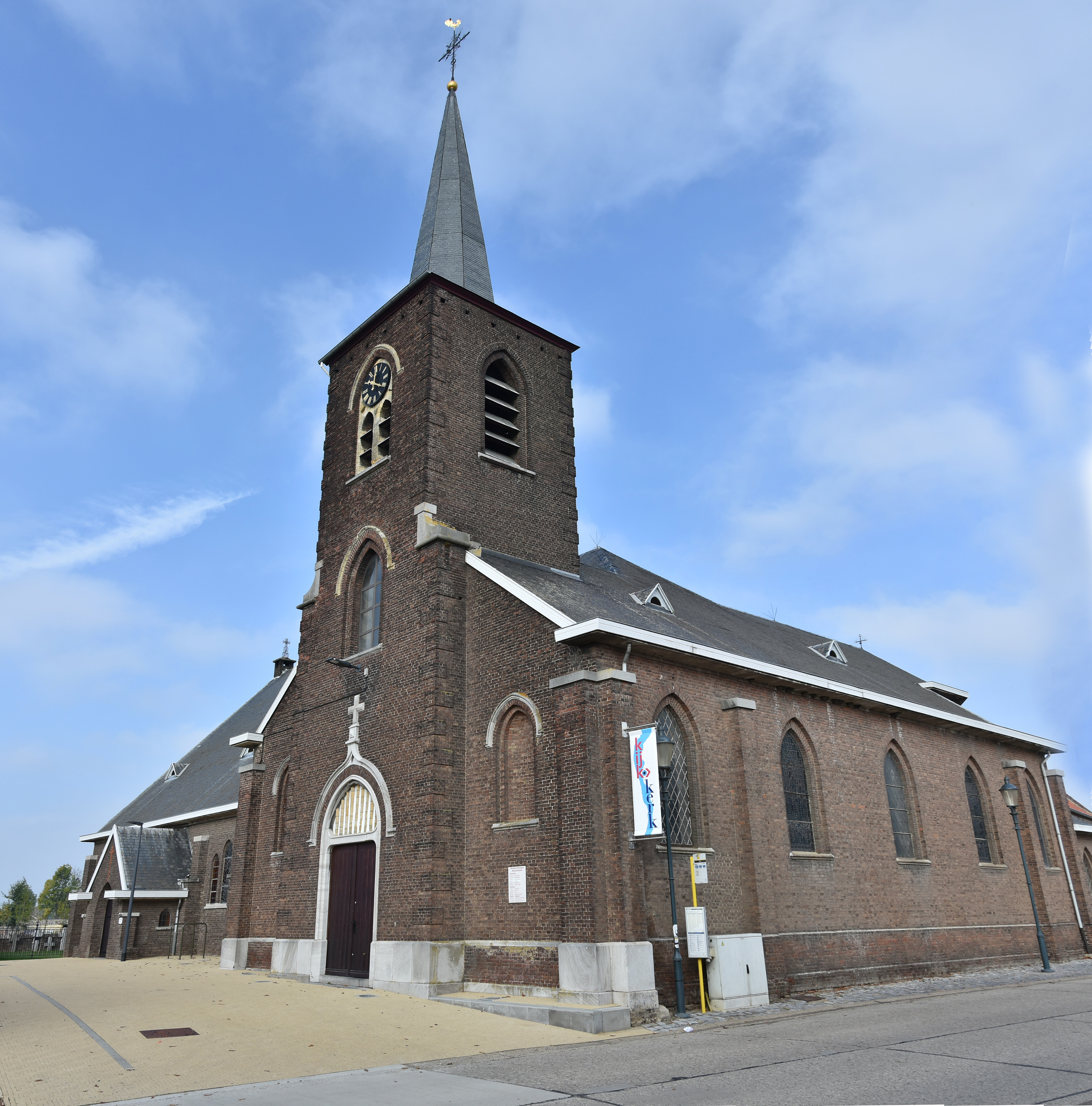 Sint-Niklaaskerk (Uikhoven) met toren en kerkschip vooraan uit 1855 19-10-2018 This photo of immovable heritage has been taken in the Flemish Region